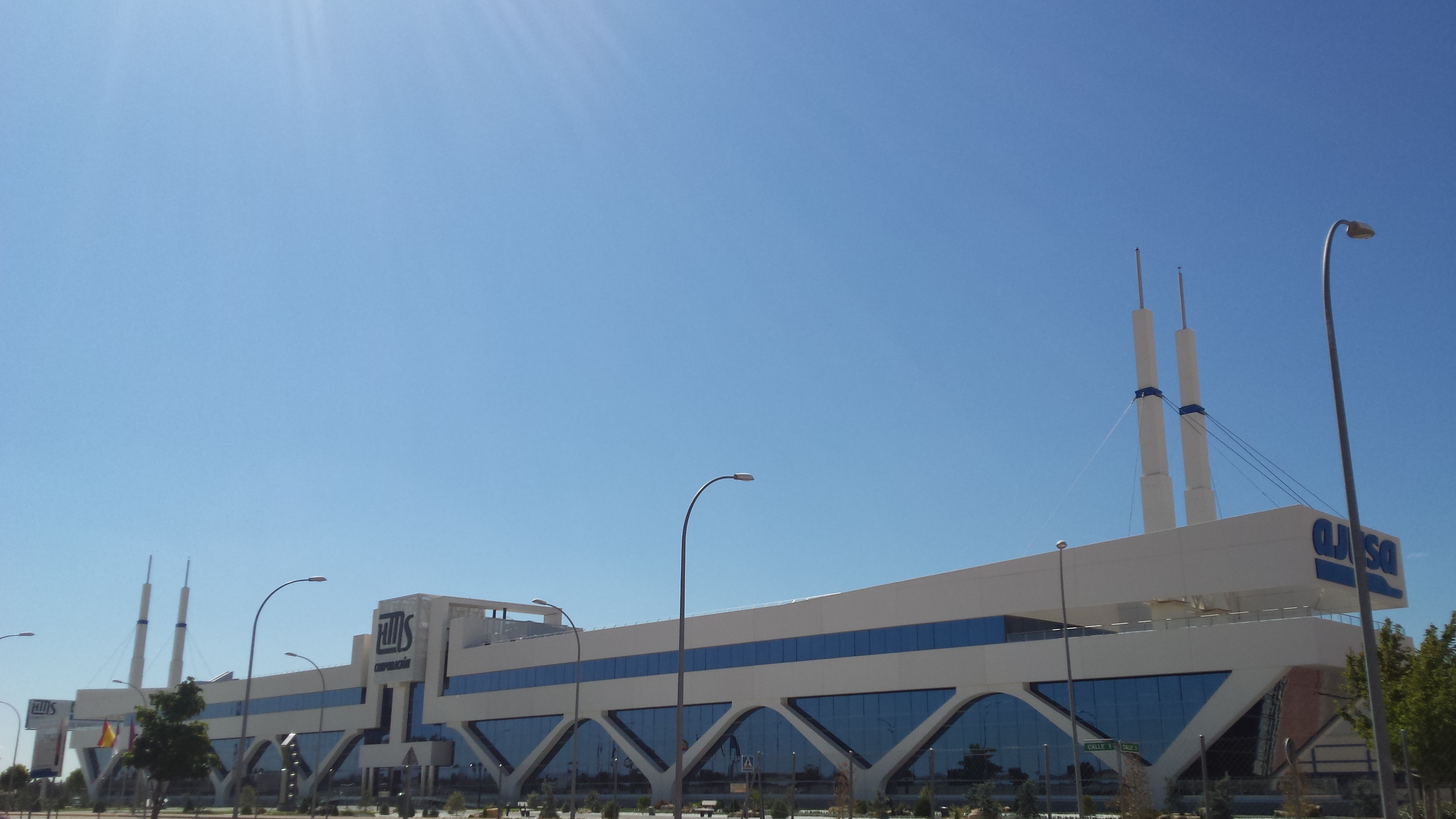 Sede social de la Corporación HMS (Ajusa). Parque Empresarial Ajusa. Albacete